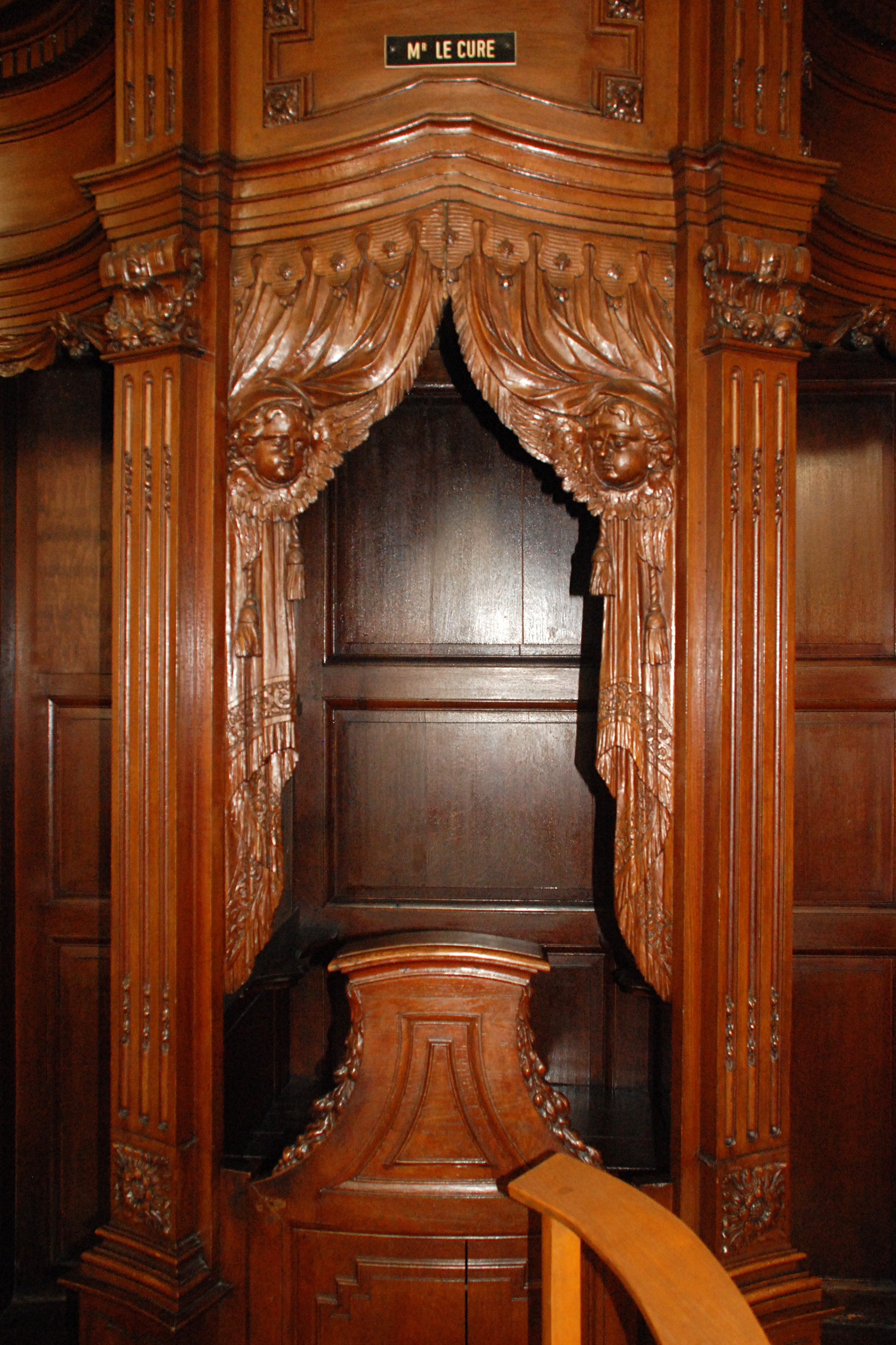 Belgique - Brabant wallon - Mont-Saint-Guibert - Église Saint-Guibert - Confessionnaux